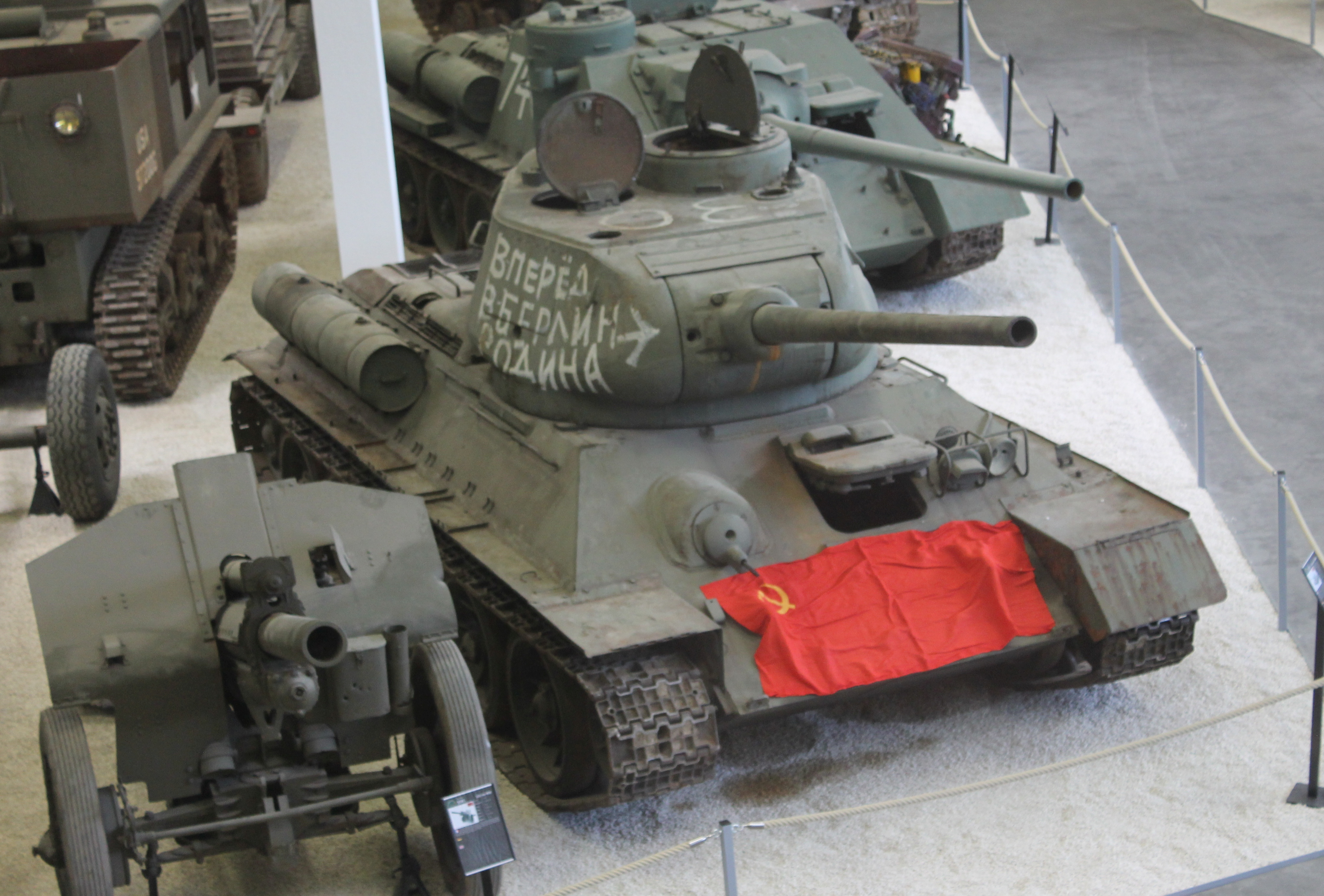 MM Parc France, Fahrzeugpark (russ. Panzer)